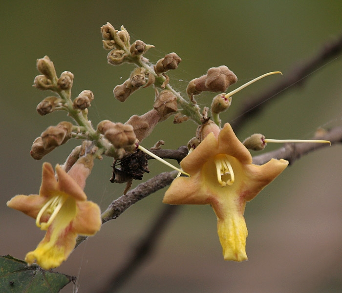 Gamhar or Kashmir Teak Gmelina arborea in Kolkata, West Bengal, India.